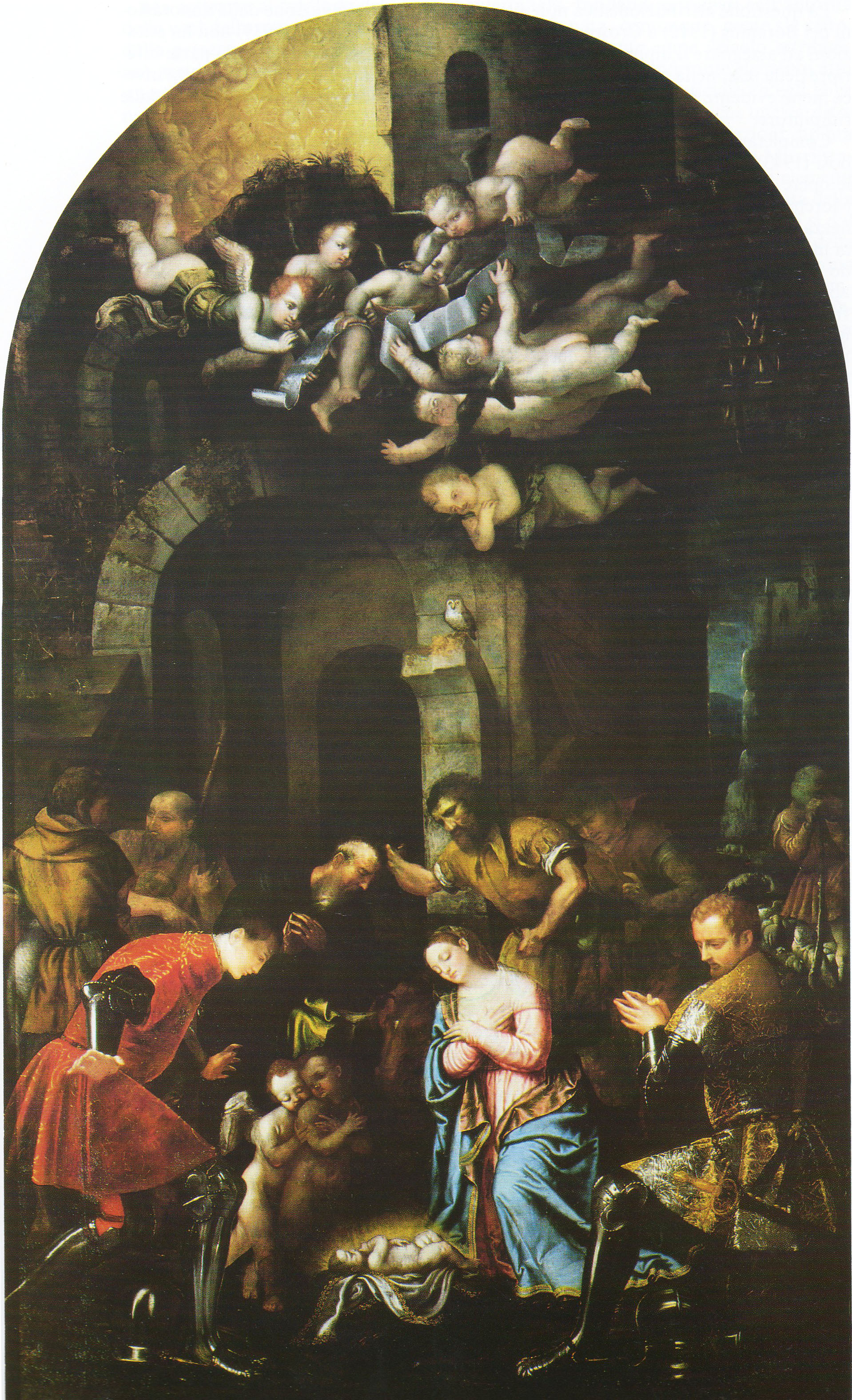 The Adoration of the Shepherds coi Santi Faustino e Giovita (o Nazaro e Celso)label QS:Lit,"The Adoration of the Shepherds coi Santi Faustino e Giovita (o Nazaro e Celso)"